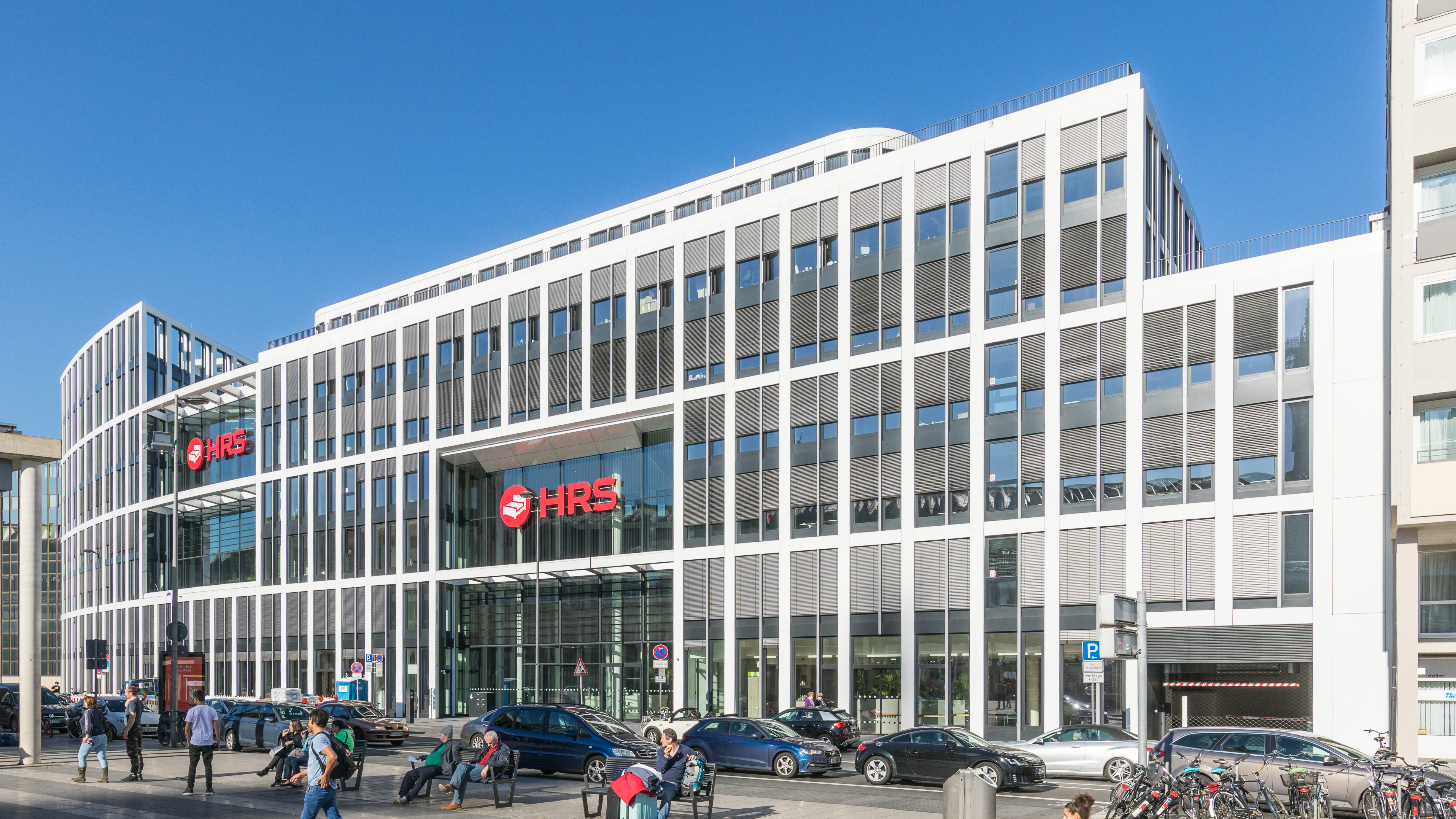 Coeur Cologne, Köln. Firmensitz von HRS